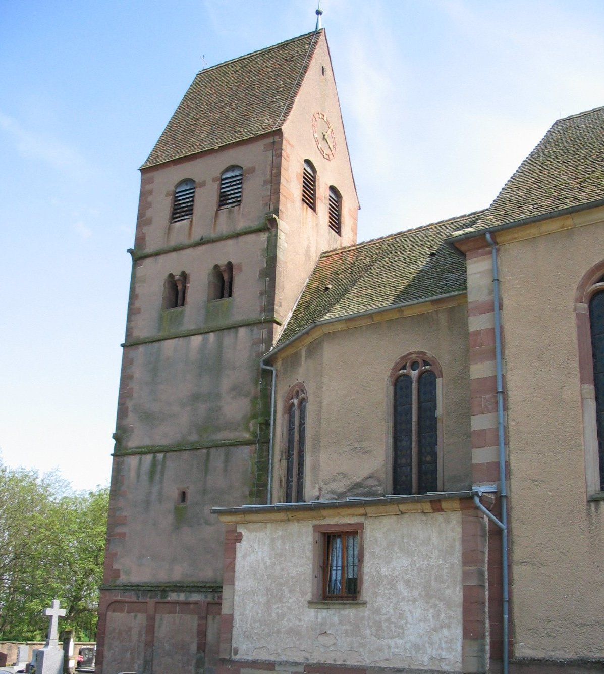 Église Saint Jacques le Majeur à Kuttolsheim. Tour du XIIe siècle.